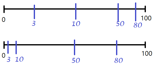 umiejscowienie liczb na umysłowej osi liczbowej (na górze - logarytmicznie)